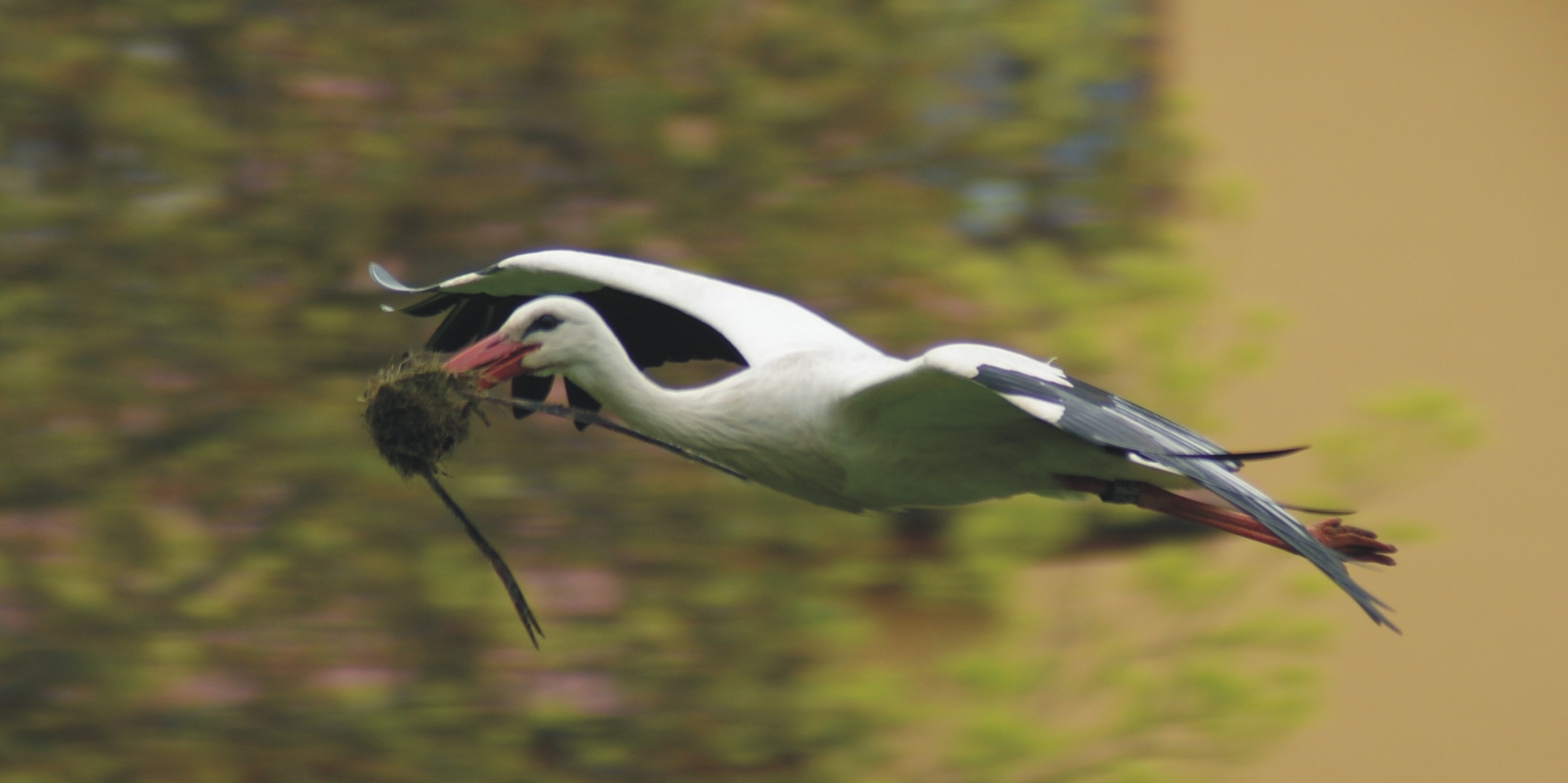 Cigogne (Ciconia ciconia) à Eguisheim